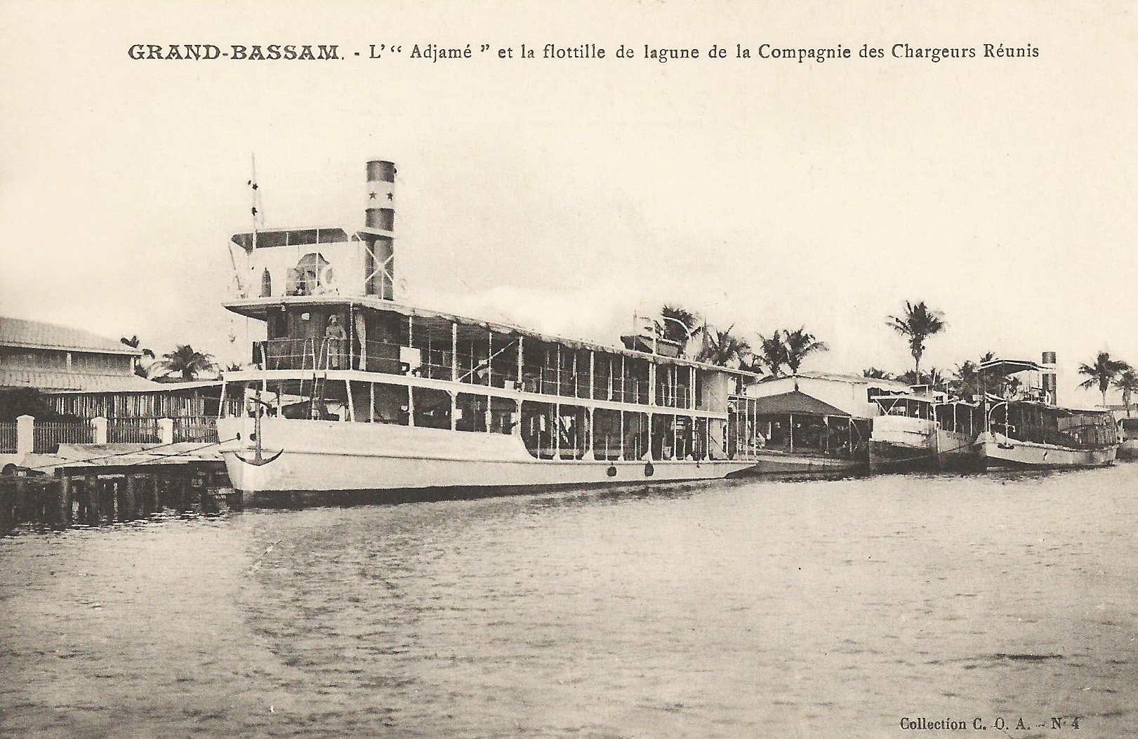 Grand-Bassam. L'"Adjamé" et la flottile de lagune de la Compagnie des Chargeurs Réunis. C.O.A. Colonies françaises. Côte d'Ivoire